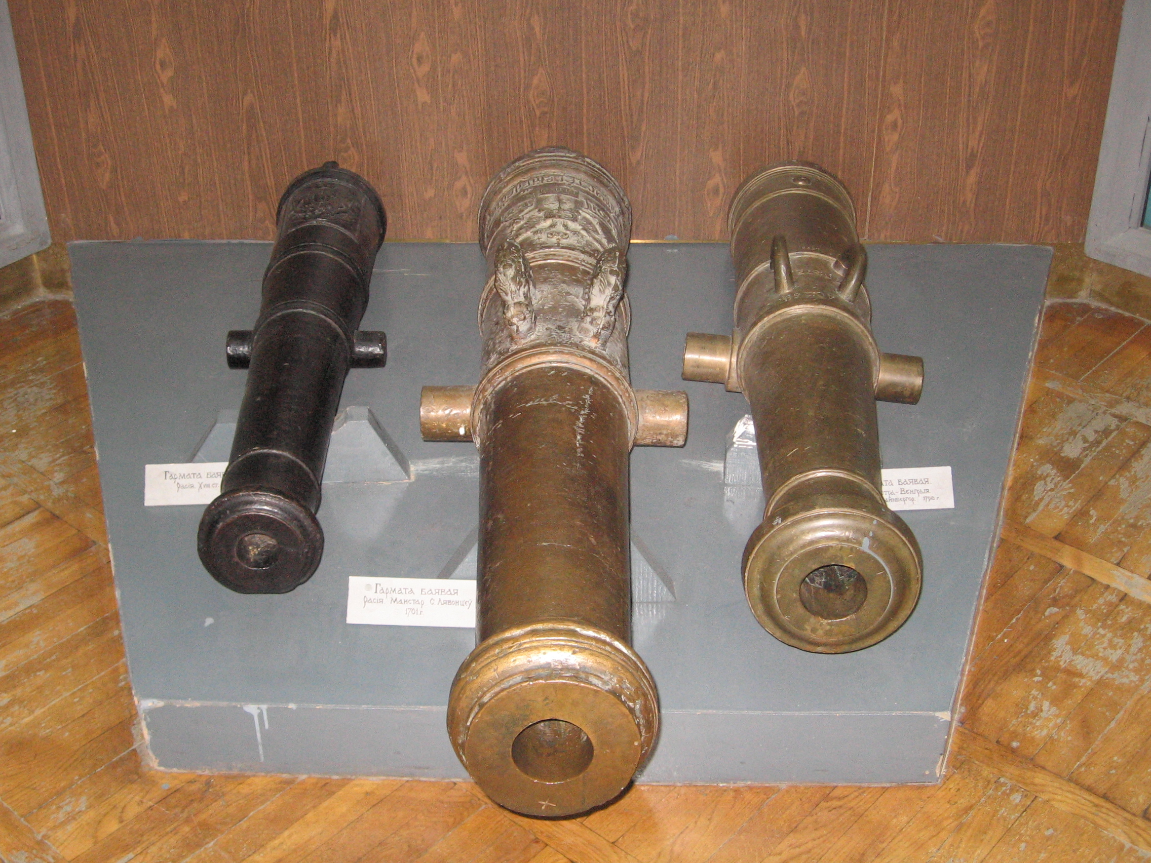 Пушки в Нац. Истор. Музее РБ, Минск